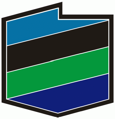 Dowództwo Generalne Rodzajów Sił Zbrojnych – oznaka rozpoznawcza – Polska.